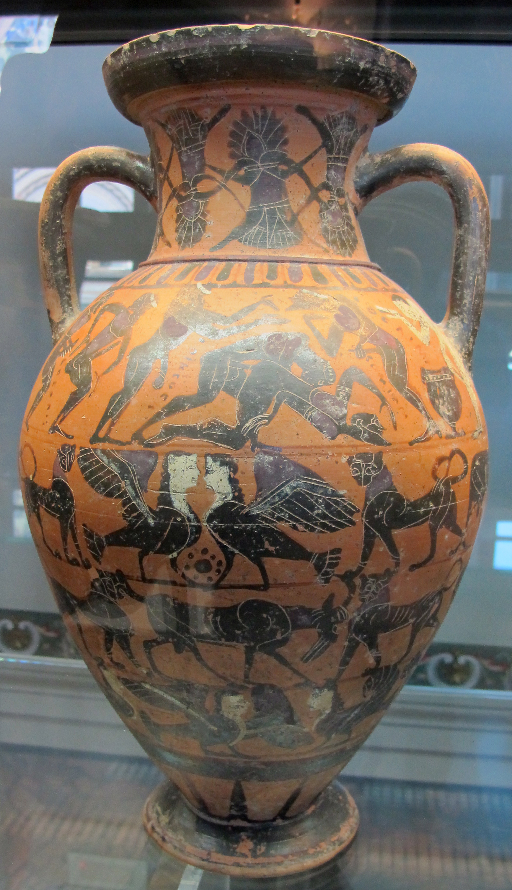 Amphore étrusque montrant une scène érotique et dionysiaque. 565-550 avant J.-C. Provenance : Orvieto. Museo Claudio Faina.